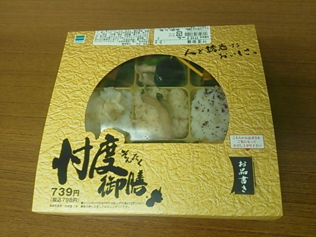 2017年11月にファミリーマートで発売されたお弁当、忖度御膳